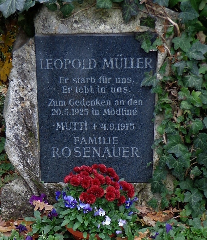 Feuerhalle Simmering - Abteilung 1 (Urnenhain, Erdgräber): Urnengrab von Gemeinderat Leopold Müller aus Mödling. Anläßlich einer von Nationalsozialisten in Mödling veranstalteten Feier am 20. Mai 1925 gab es blutige Zusammenstöße, bei denen Müller, damals der Obmann der Mödlinger Sozialdemokraten, getötet wurde. (Abteilung 1, Ring 2, Gruppe 4, Nummer 14)